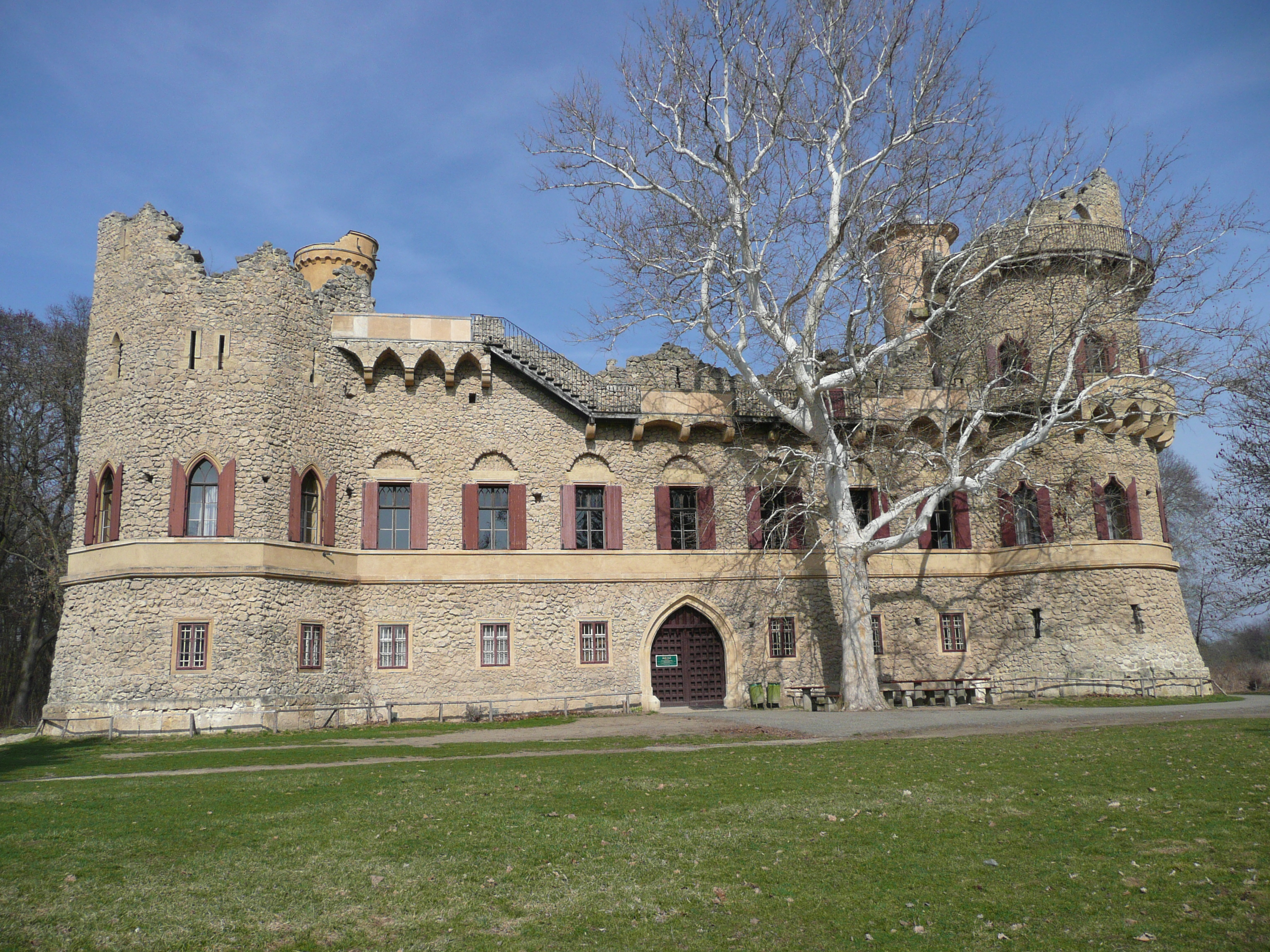 Zámek Janův hrad Podivín, Vlčí louka 348, Podivín